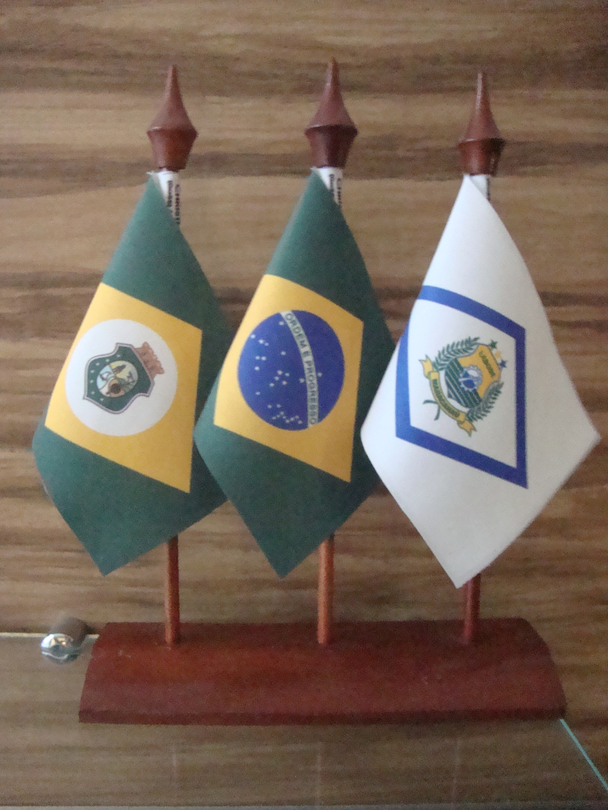 Seguindo a posição adequada (como observador): Brasil ao meio, estado (Ceará) à esquerda, município (Maracanaú) à direita.